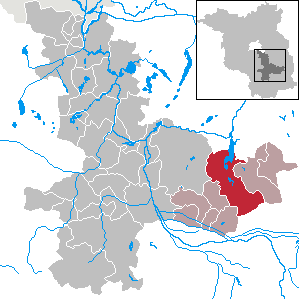 Schwielochsee in Brandenburg (Country) - District Dahme-Spreewald